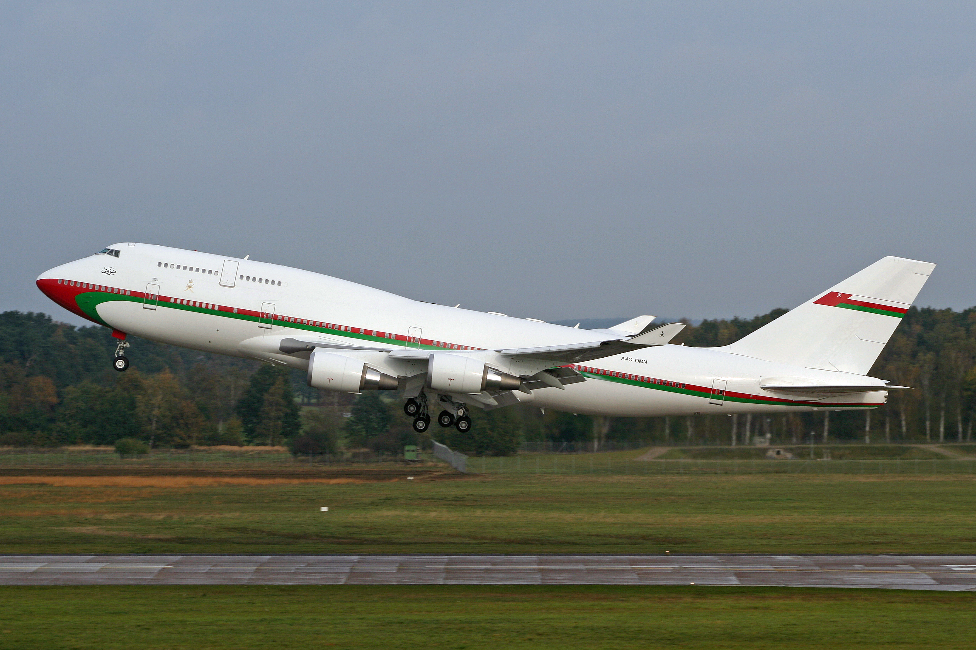 Haj / Eddv 4-11-2006